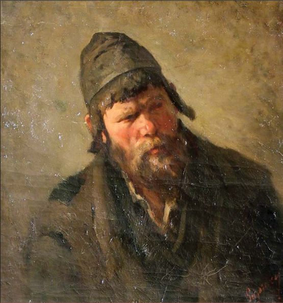 Evreu din Moldova (numel dat de George Oprescu) sau Evreu galițian (numele sub care îl prezintă Muzeul Brukenthal din Sibiu) - semnat dreapta jos cu roșu: Grigorescu - Muzeul Național de Artă al României (astăzi la Muzeul Brukenthal din Sibiu).